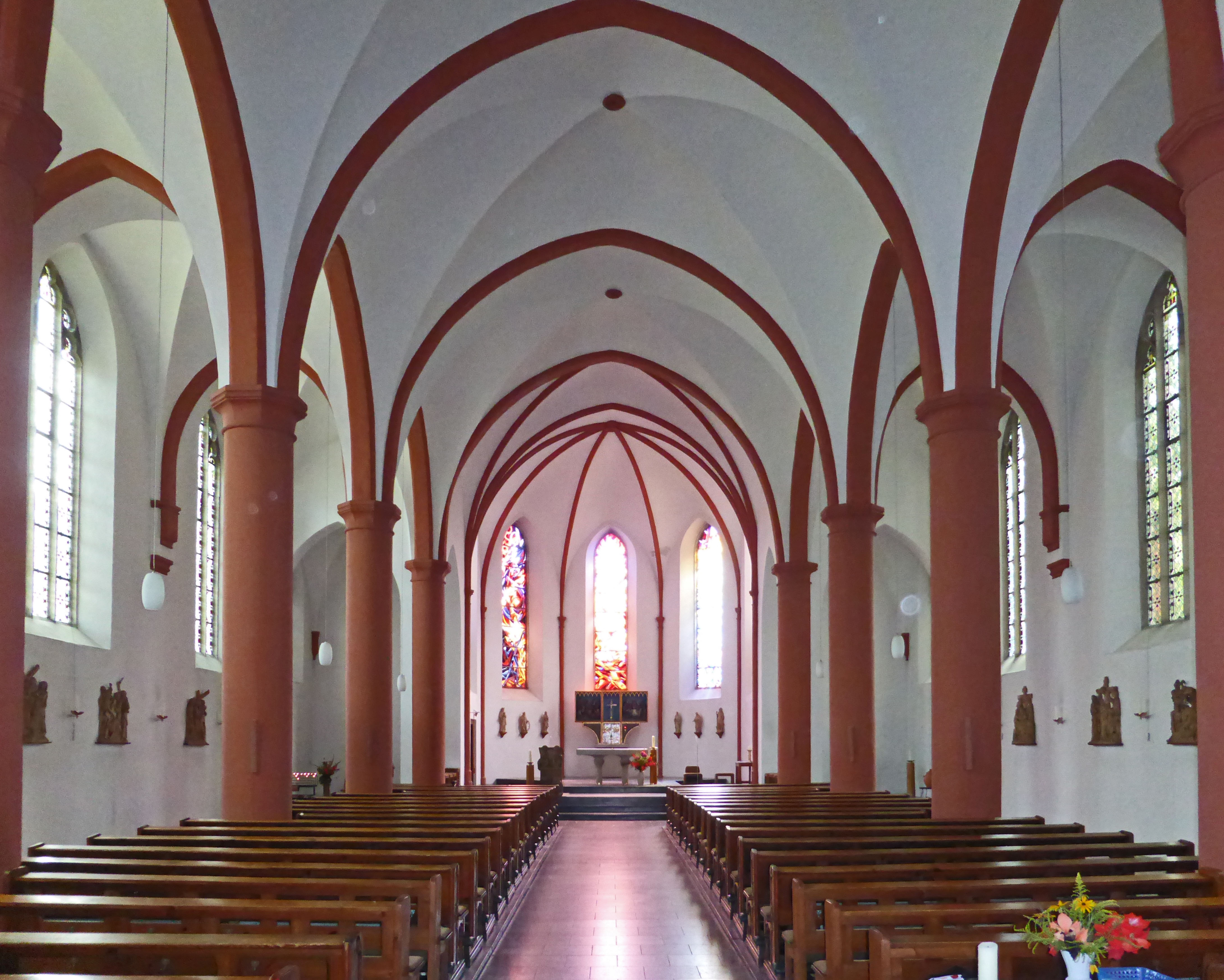 Kath. Kirche St. Johannes der Täufer in Burg bei Magdeburg.